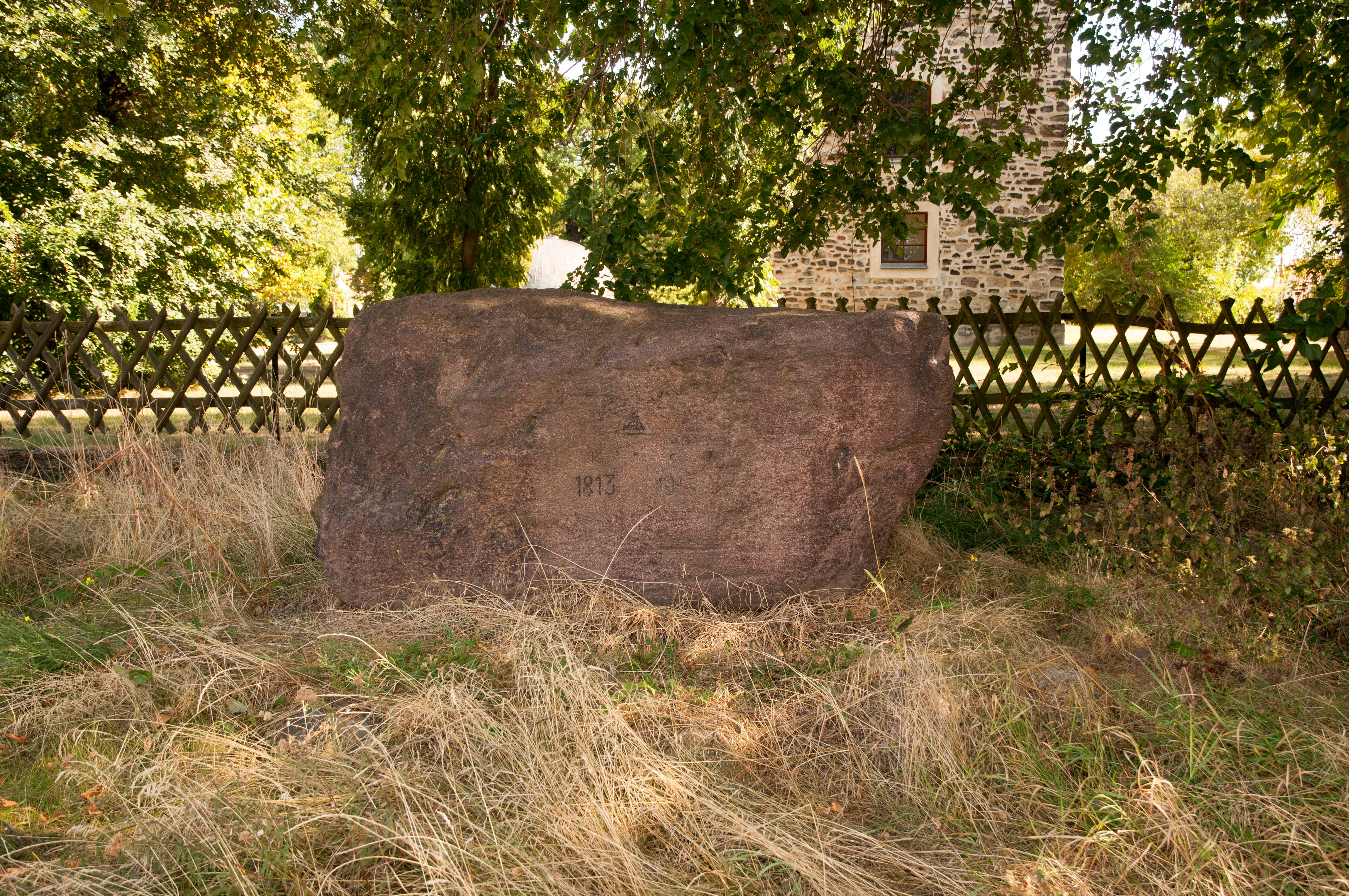 Gedenkstein für die Schlacht vom 18. Oktober 1813 gegen Napoleon, 1913 errichtet, Halle-Kanena, Zum Planetarium